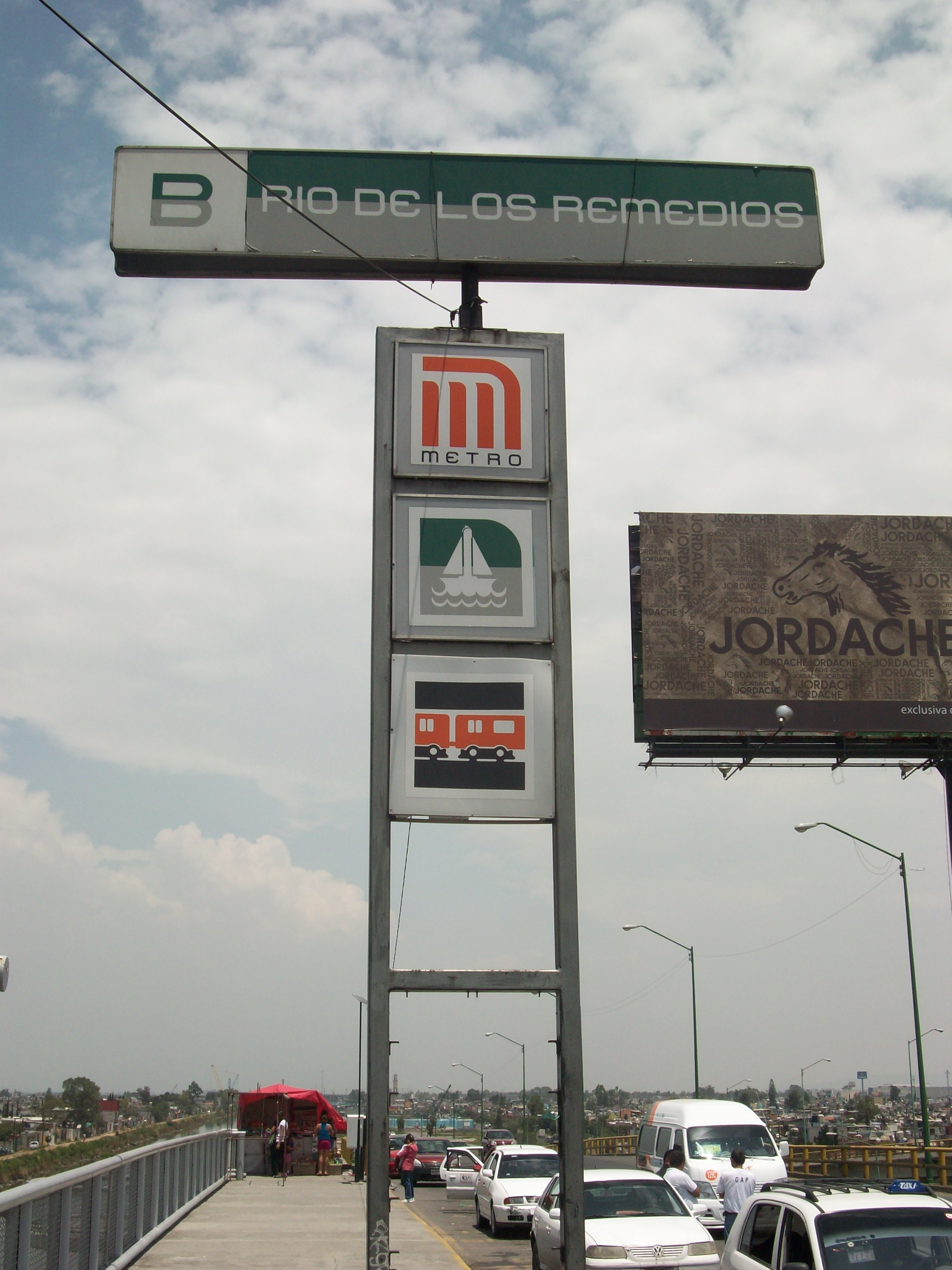 Letrero de la estacion Rio de los Remedios